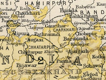 Kartenausschnitt Jaitpur